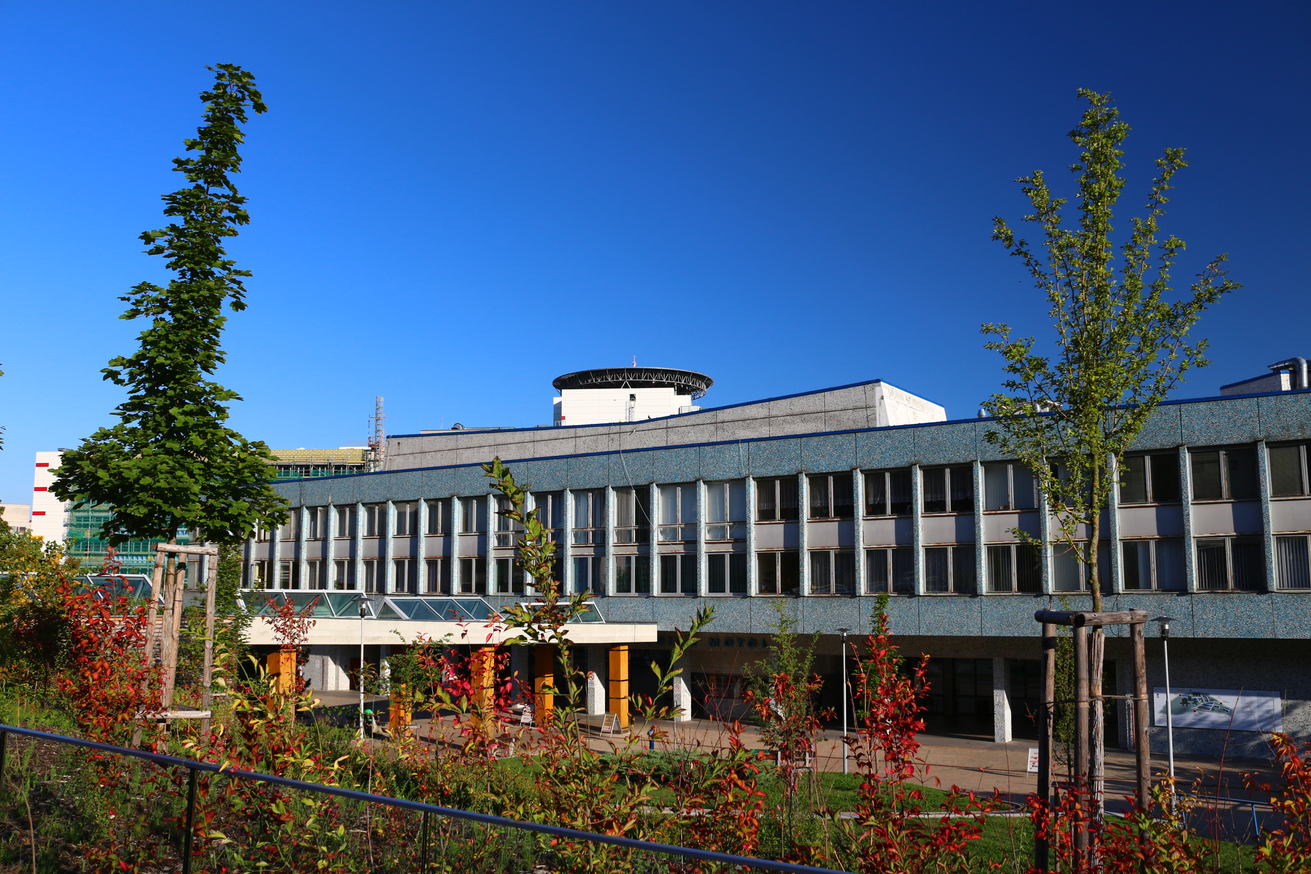 Nemocnice Motol